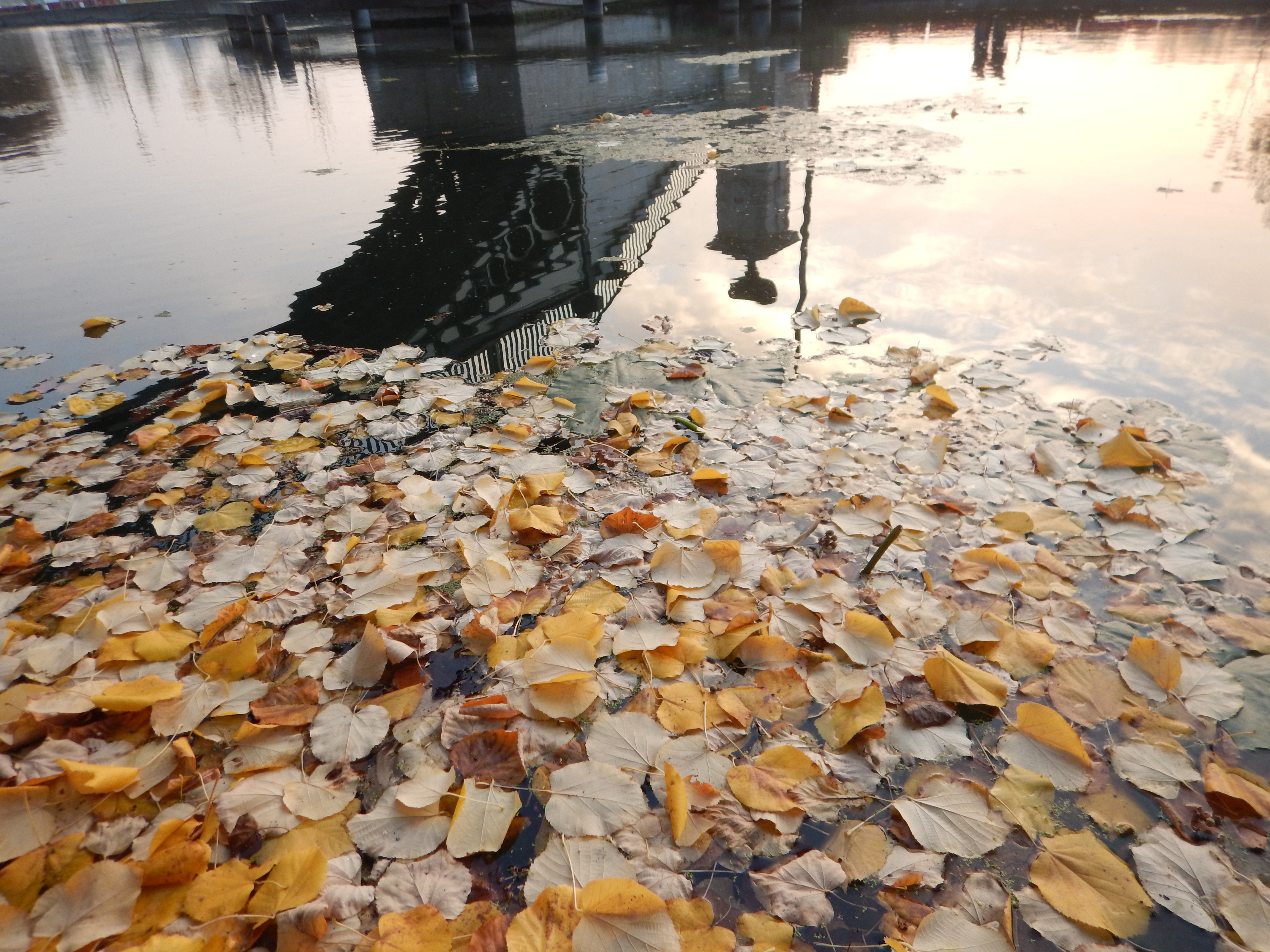 Accumulation de feuilles mortes en automne (oct 2016) près du Pont Napoléon sur la Moyenne-Deûle (rivière semi-artificialisée et à courant très lent) sur une zone occupée (depuis 1 an) par des feuilles flottantes de nénuphar (Nénuphar jaune. Ce nénuphar contribue ainsi à légèrement freiner l'export de feuilles mortes vers l'aval, constituant une cache supplémentaire pour certains poissons et une source de matière organique et de nutriments pour l'écosystème local.